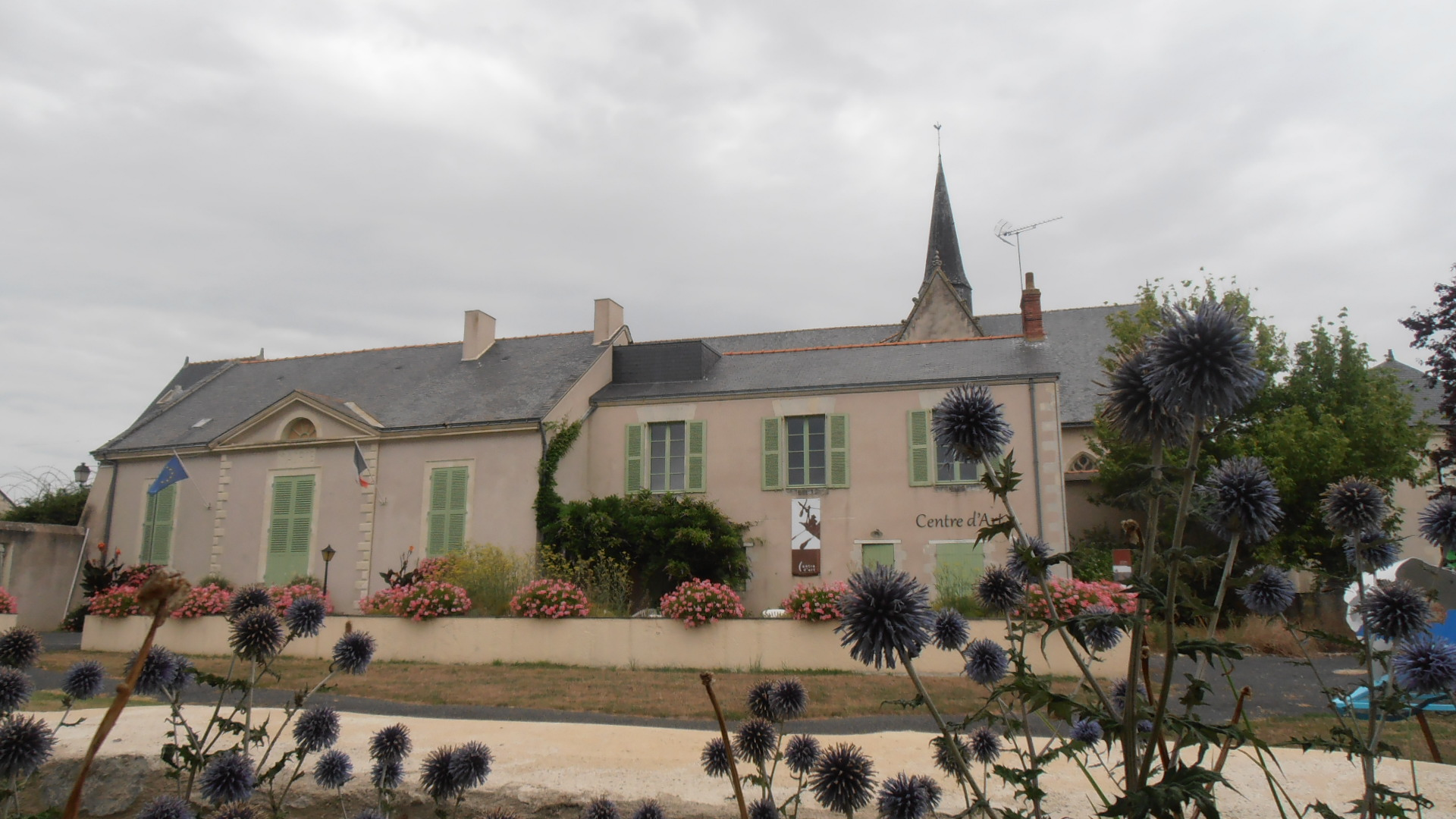 la mairie sur la gauche, le centre d'art sur la droite